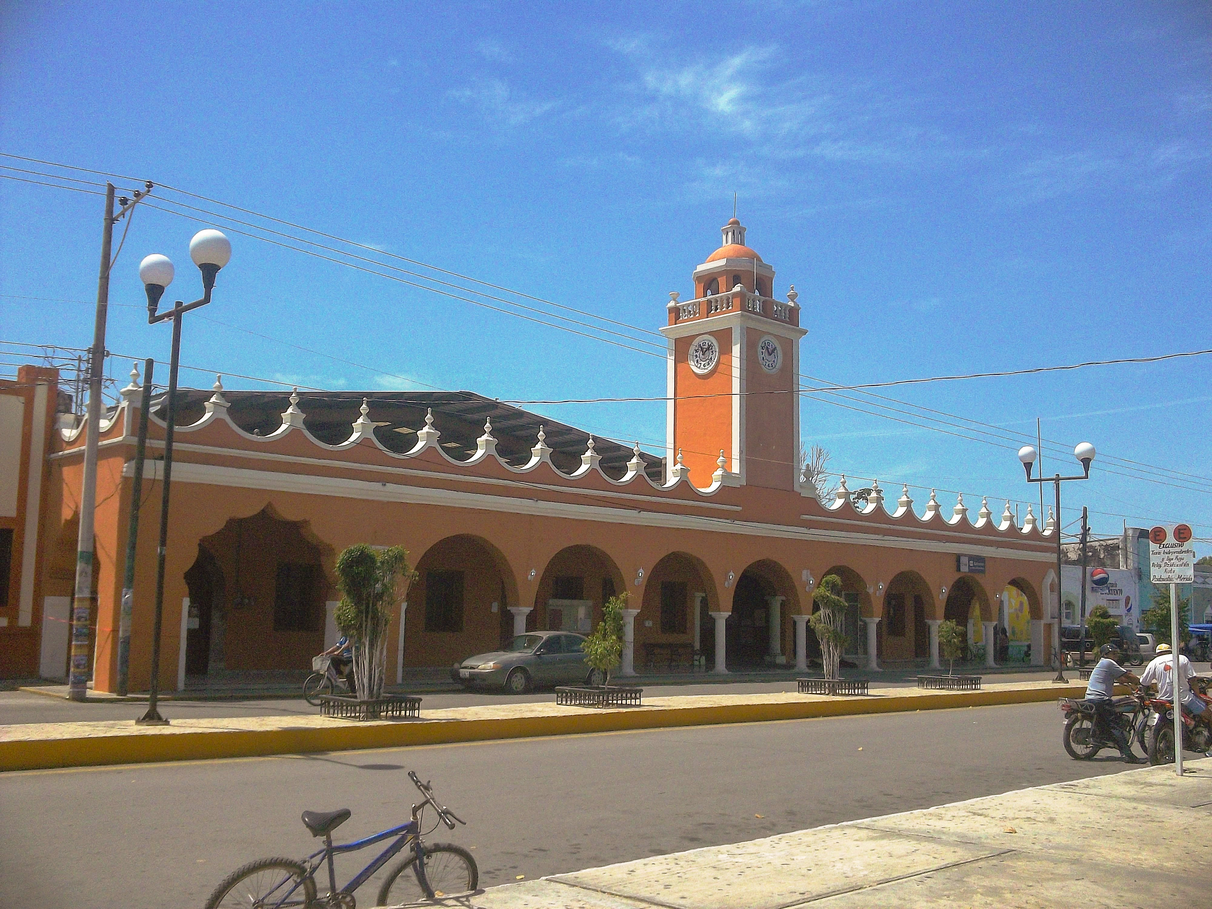 Palacio municipalde Dzidzantún, Yucatán.